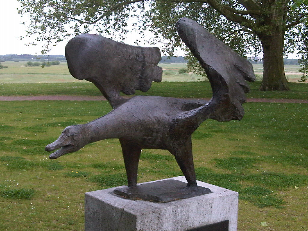 Afbeelding scupture De Gans Bastion Oranje 's-Hertogenbosch